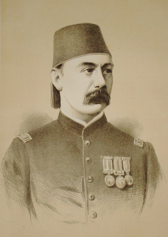 Portrait du général Valentine Baker, dit Baker pasha, vers 1880. Gravure d'époque.